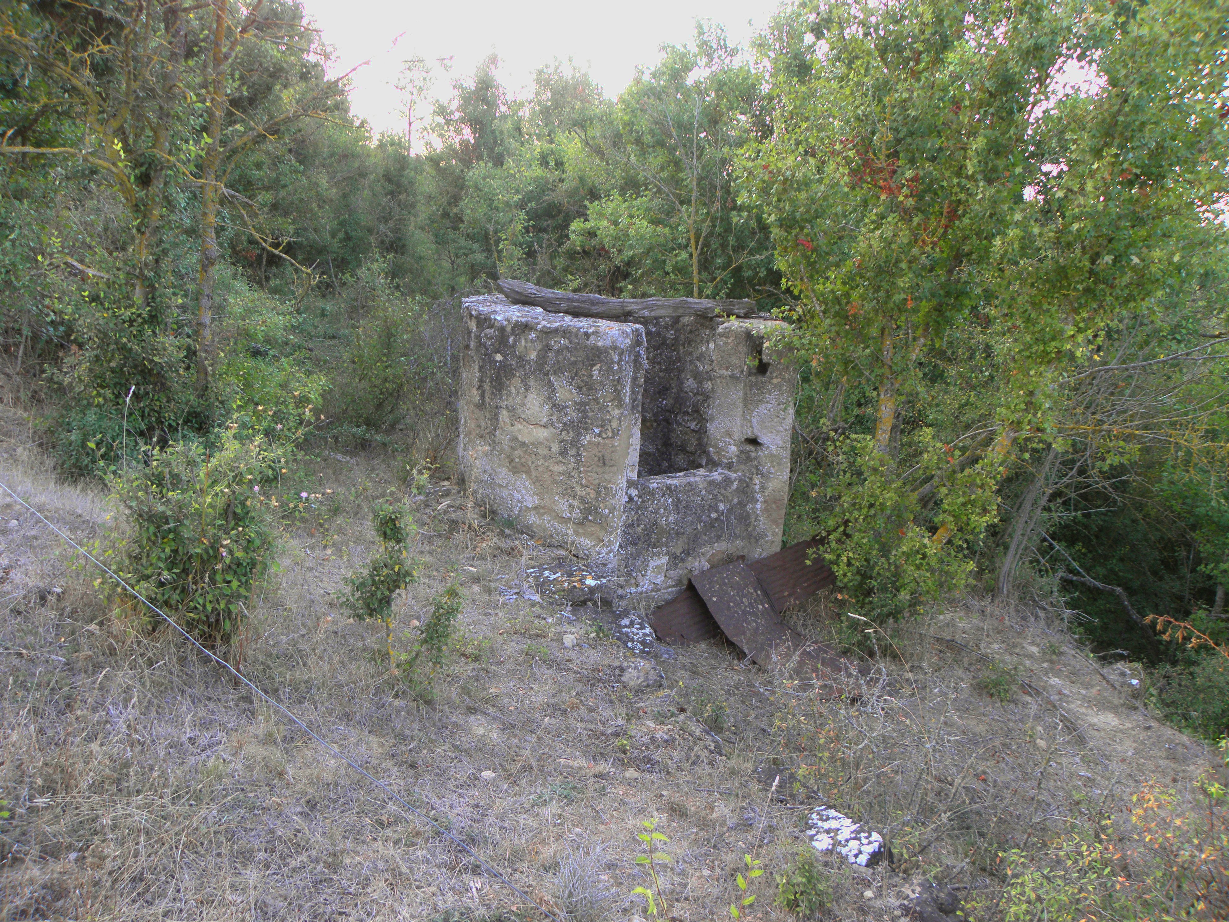 El pou del nucli de Madrona (Pinell de Solsonès).